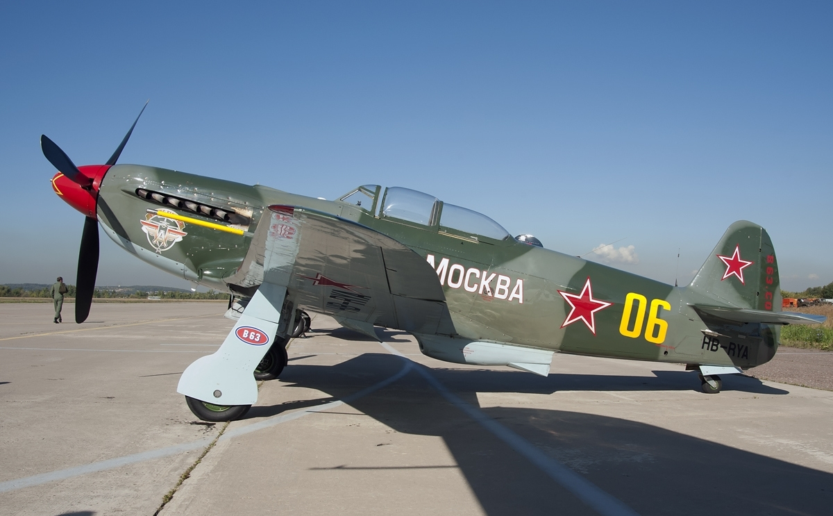 Yakovlev Yak-9UM HB-RYA